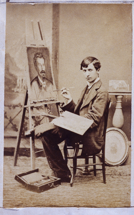 Obra que integra o acervo do Museu Paulista da USP. Coleção Militão Augusto de Azevedo.